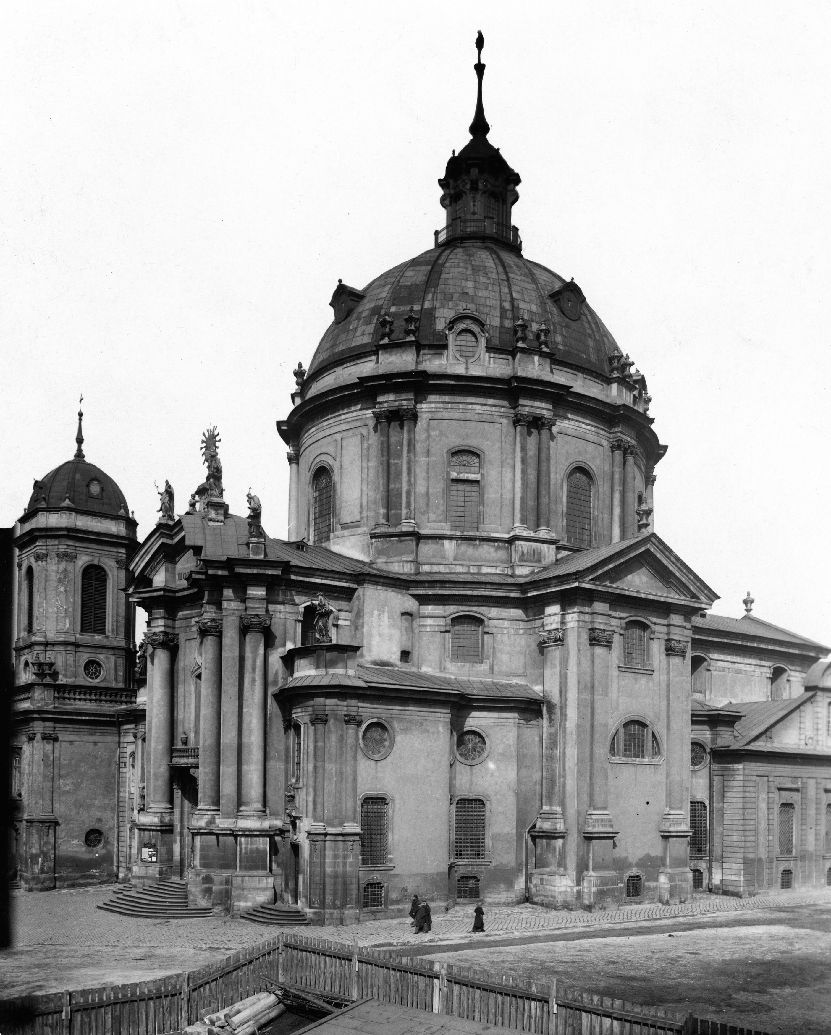 Kościół O. O.Dominikanów we Lwowie.